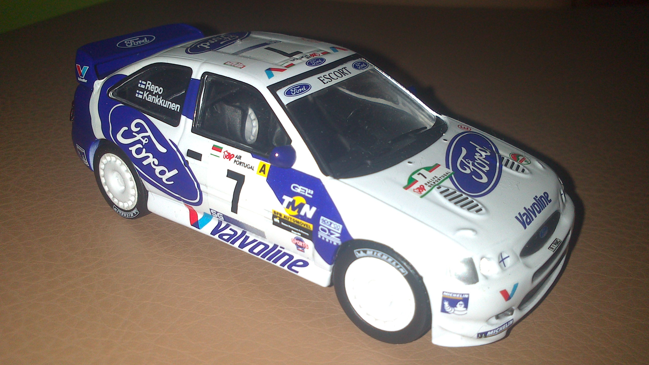 Ford Escort WRC model - Juha Kankkunen/Juha Repo, Rally Portugal 1998